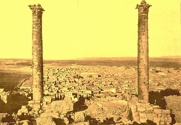 Las dos grandes colummnas de Edesa, la antigua ciudad asiria, hoy día Sanliurfa en Turquía.Fotografía del libro Early eastern Christianity de F. Crawford Burkitt, 1904.